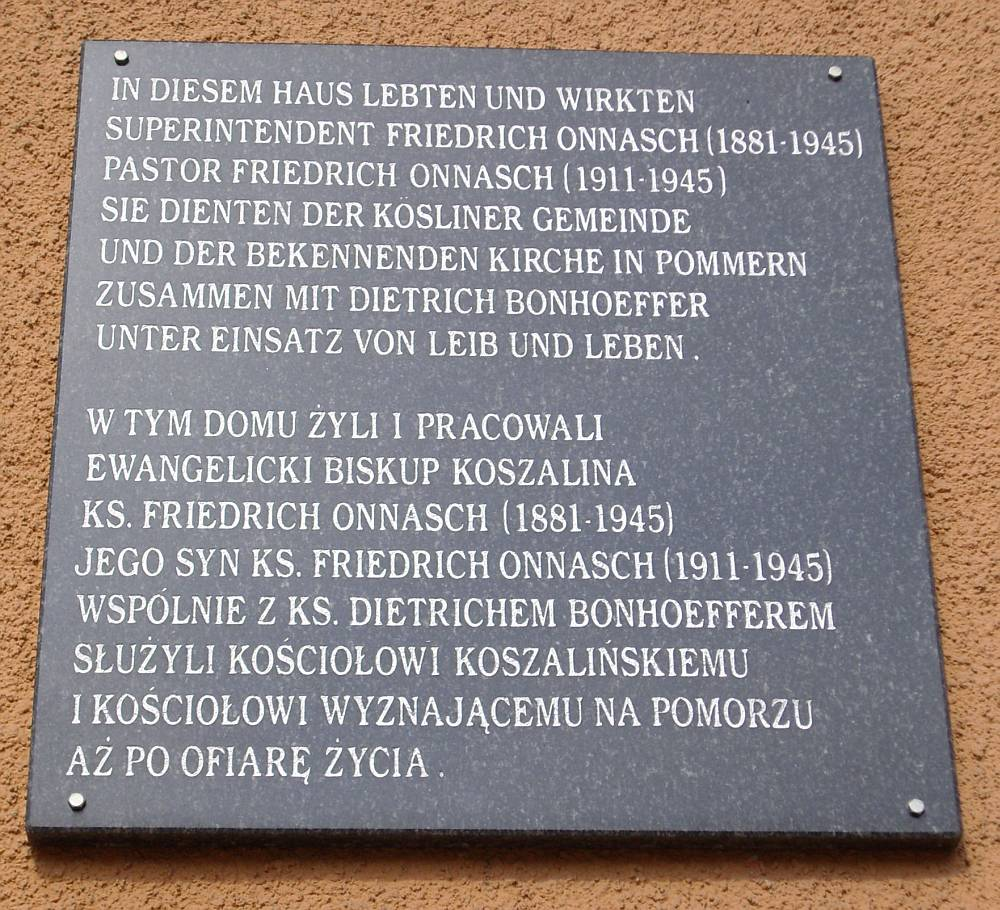 Tablica poświęcona niemieckim biskupom ewangelickim Onnasch w Koszalinie.